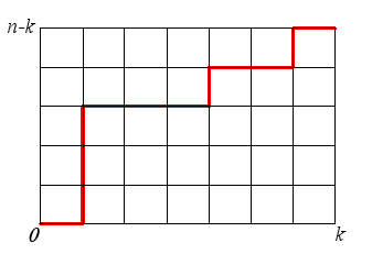 Chemin dans un quadrillage